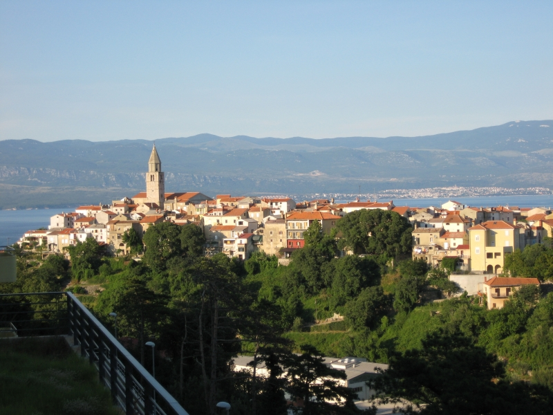 Vrbnik, Krk, Croatia